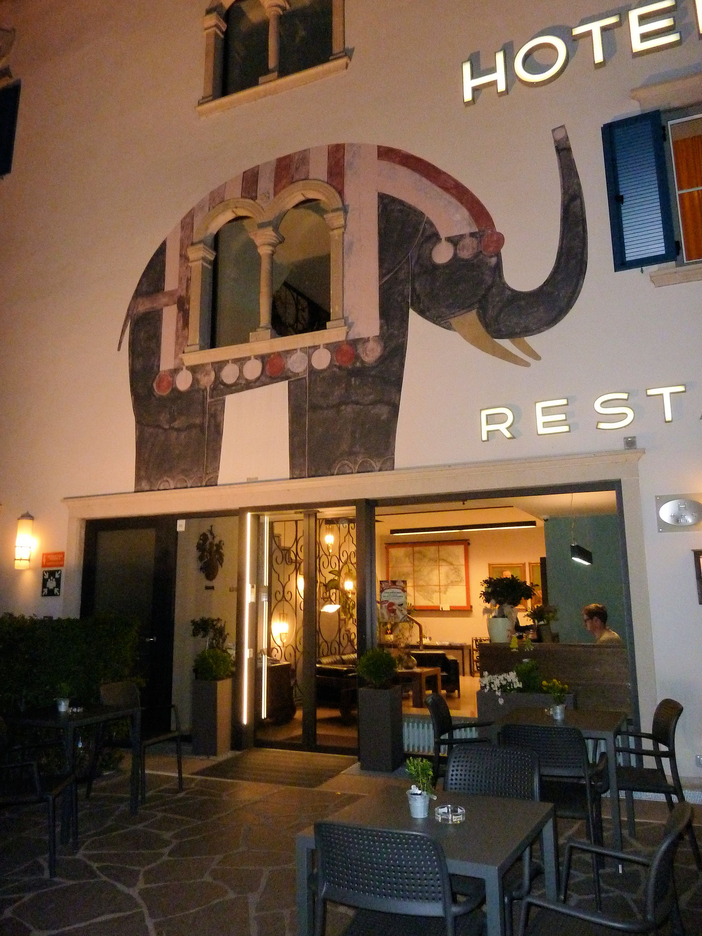 Hoteldeko in Auer